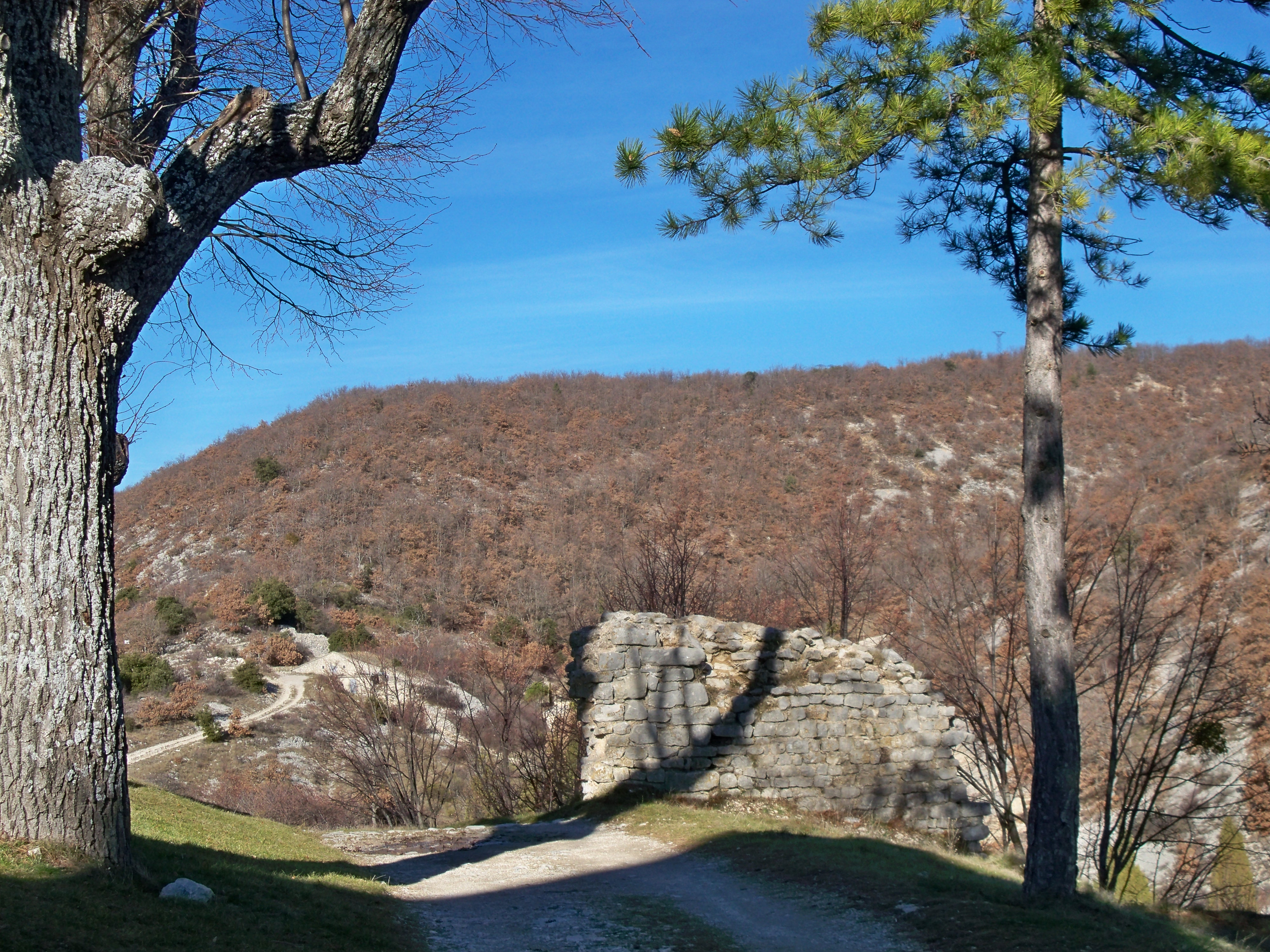 ancien rempart de Banon (04), France